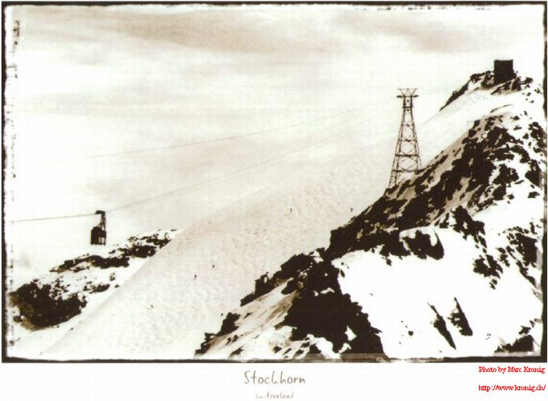 Foto storica della funivia dello Stockhorn